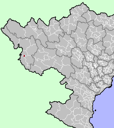 Dien Bien Phu District, Dien Bien Province, Vietnam.